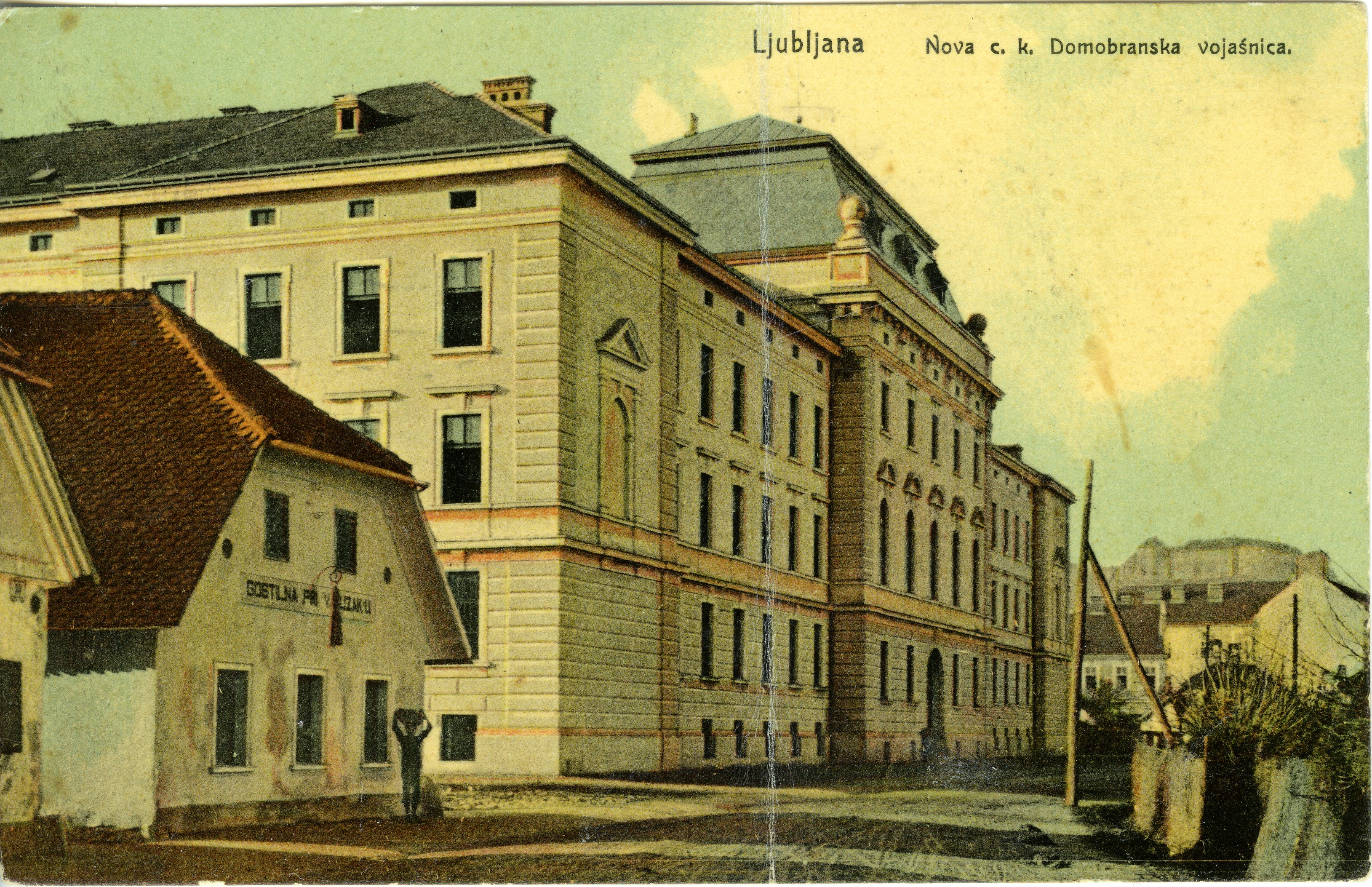 Domobranska vojašnica.